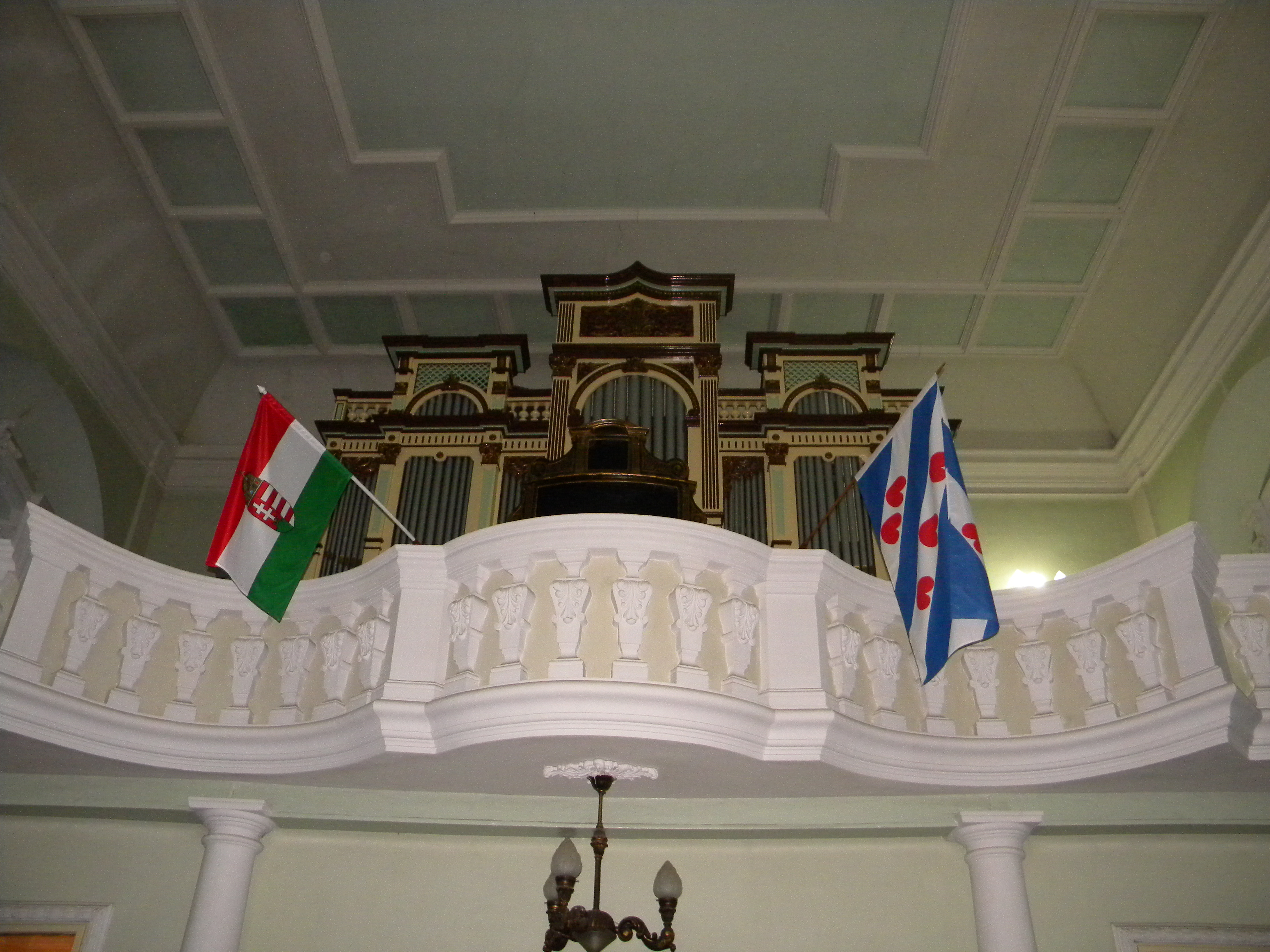 Láncos templom karzat, orgonaRomână: Organul Bisericii cu lanturi din Satu Mare